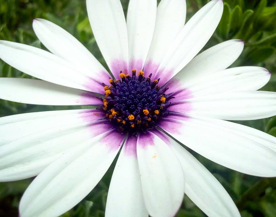 Dimorphotheca ecklonis como planta ornamental en jardín de Argentina.